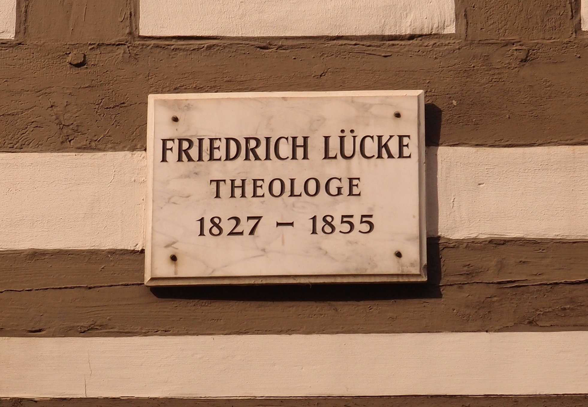 Gedenktafel für den Theologen Friedrich Lücke (1791-1855) in Göttingen, Lange Geismar Straße 19